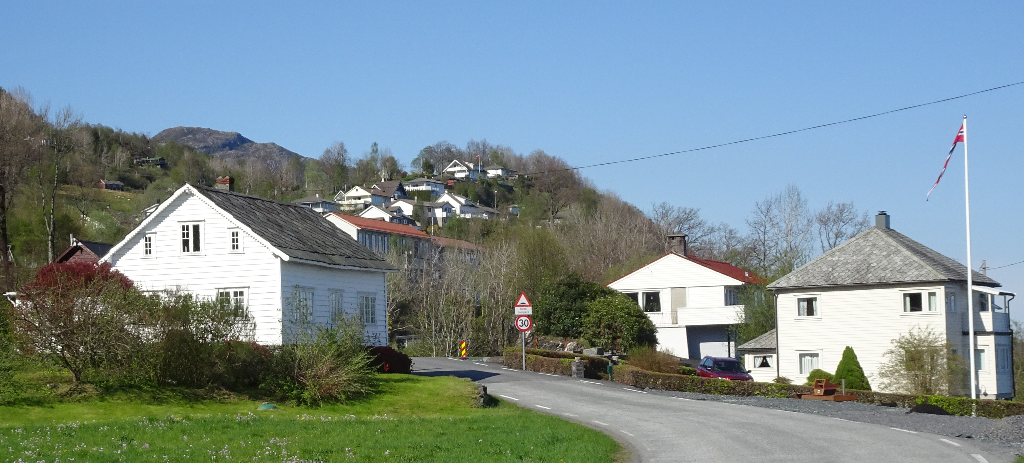 Onarheim, langs fylkesvei 78 nordøst for kirken